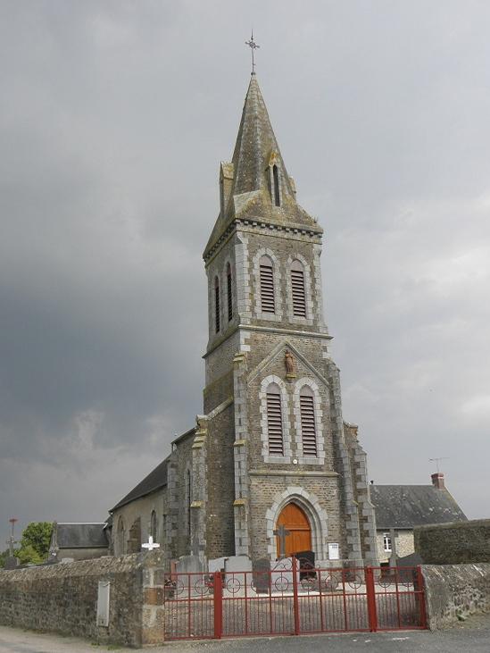 Église paroissiale de Crollon (50).